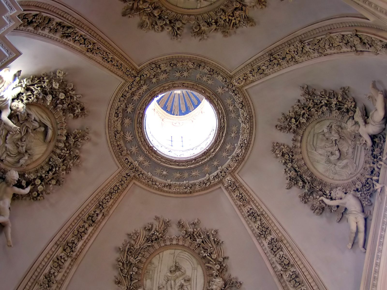 Cappella Lancellotti, Basilica di San Giovanni in Laterano